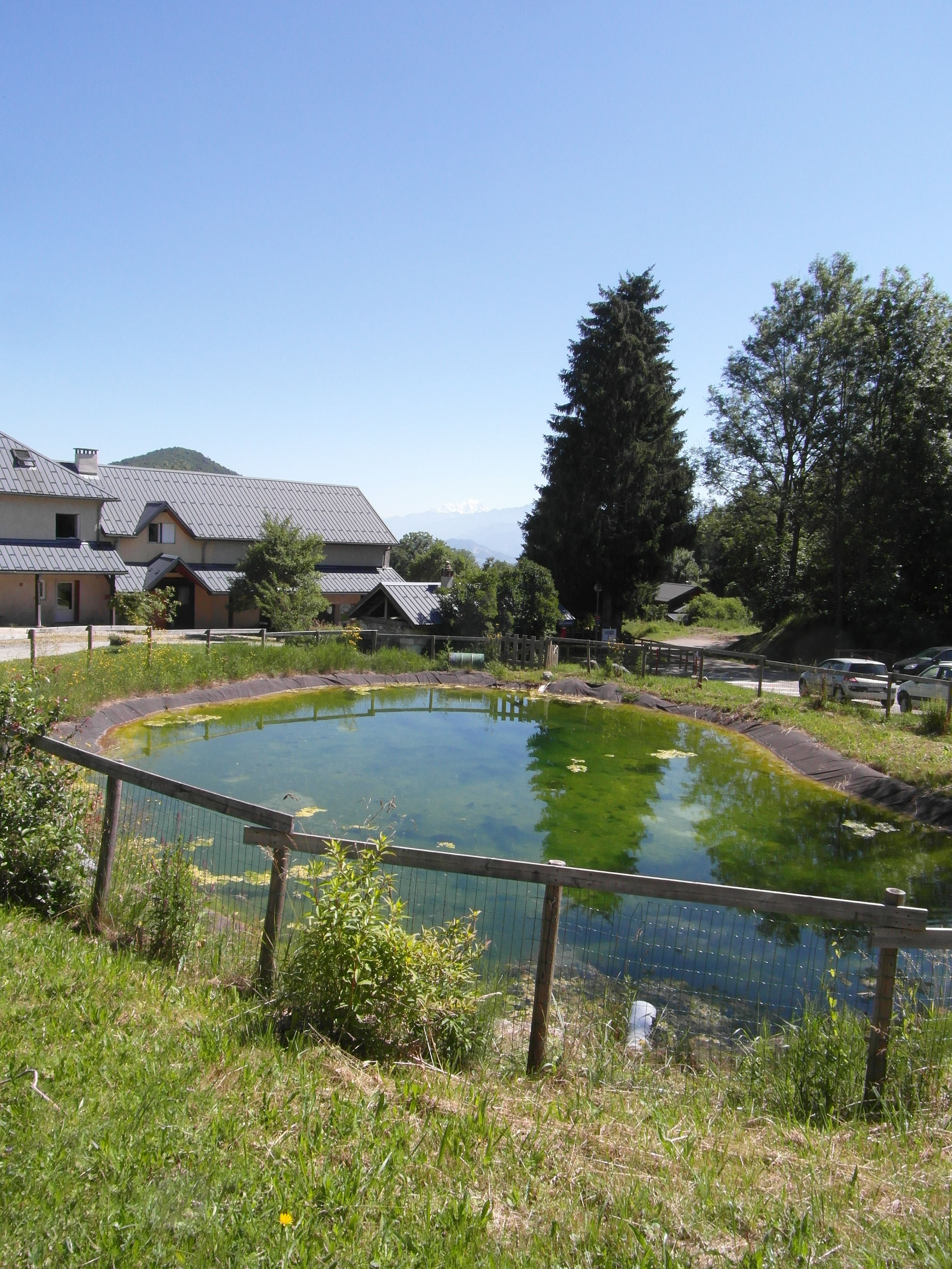 Etang du hameau de Belle chambre